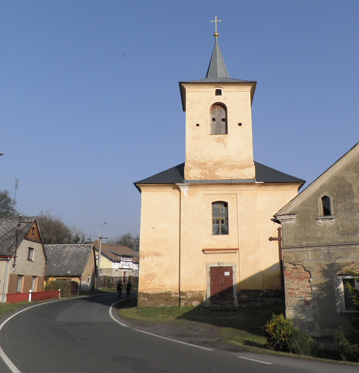 Kostel svatého Michala, Brložec (Štědrá).